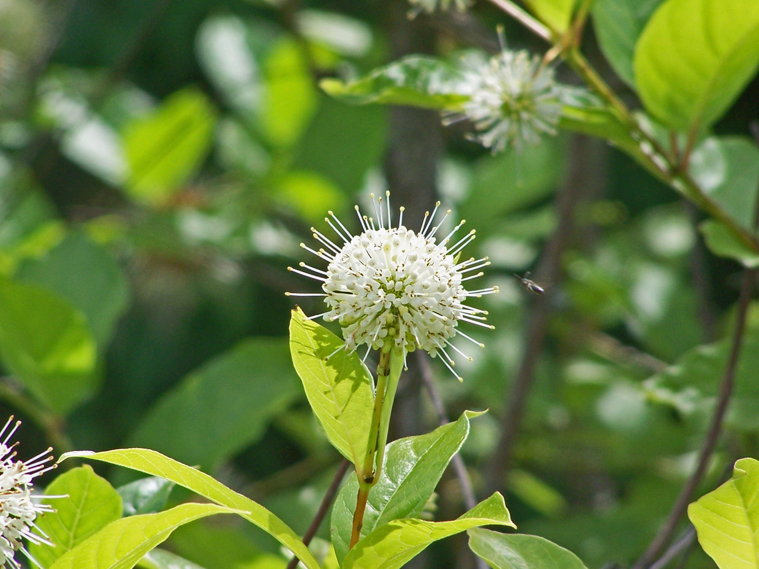 Cephalantus occidentalis Westlicher Knopfbusch , Botanischer Garten Berlin